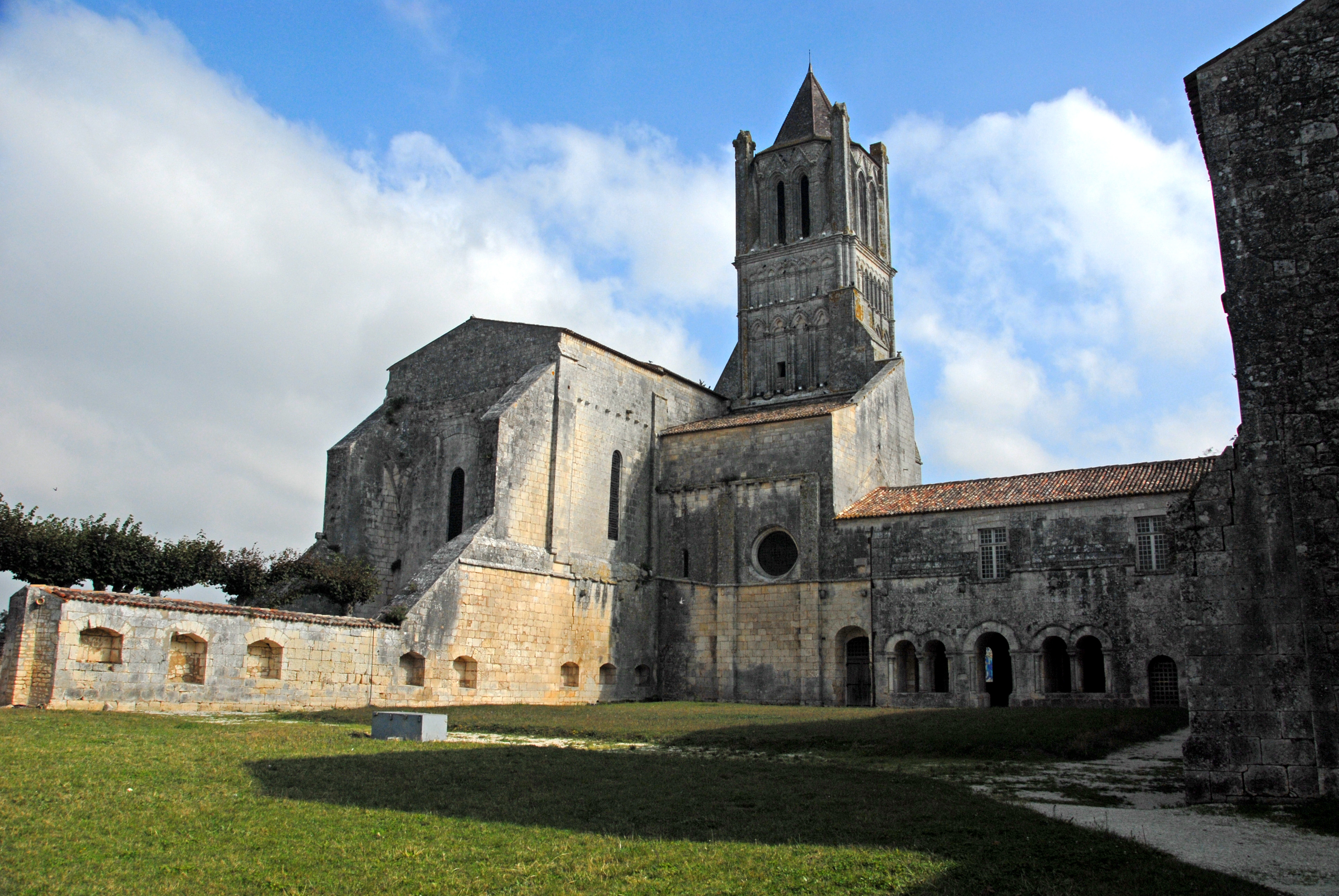 Sablonceaux, Ansicht von Westen